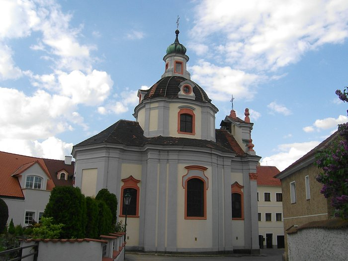 Česky: Chrám od Rybářského náměstí